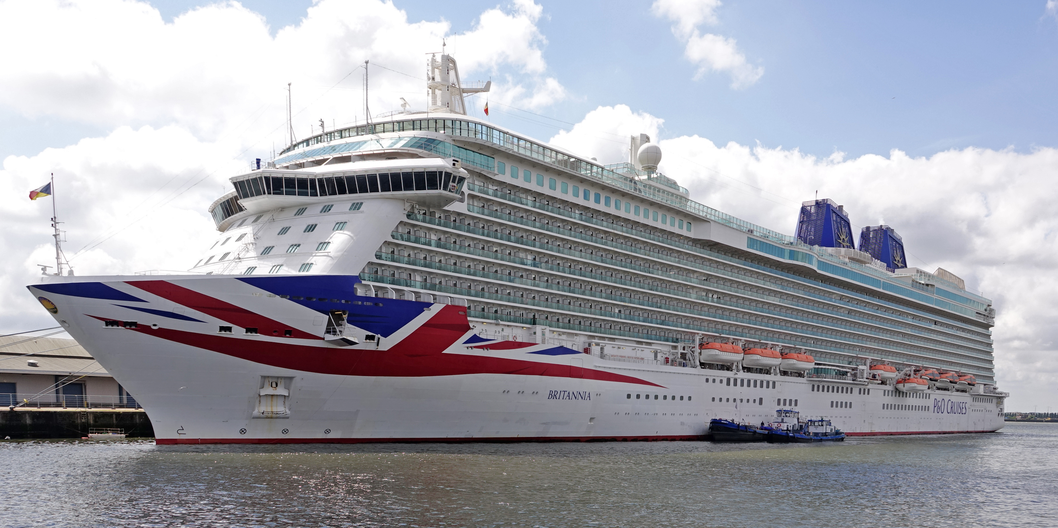 Merwehaven Rotterdam 6-6-2019